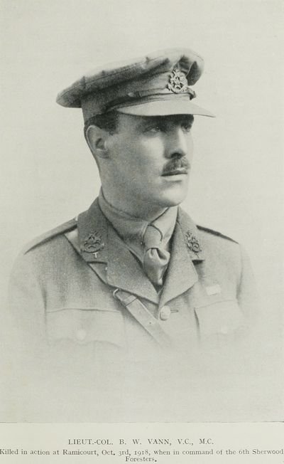 Lieut.-col. B. W. Vann, V.C., M.C.